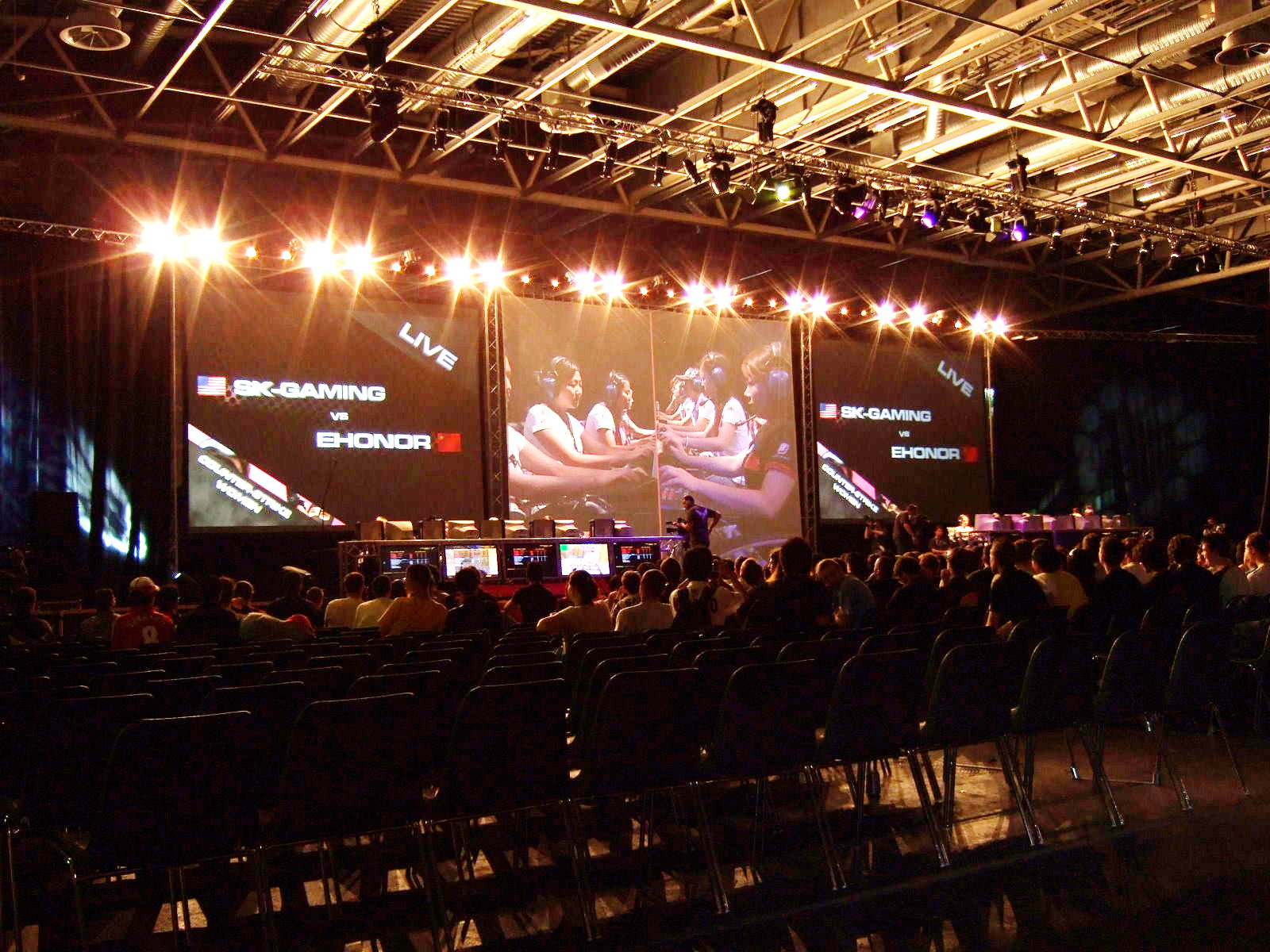 Finale Counter-Strike Féminin sur la scène